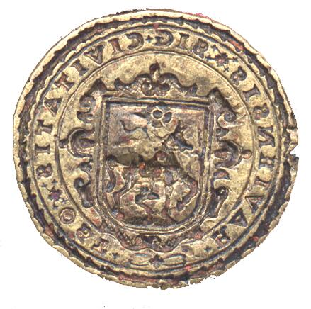 Pečetidlo města Moravská Ostrava z 1. poloviny 17. století.